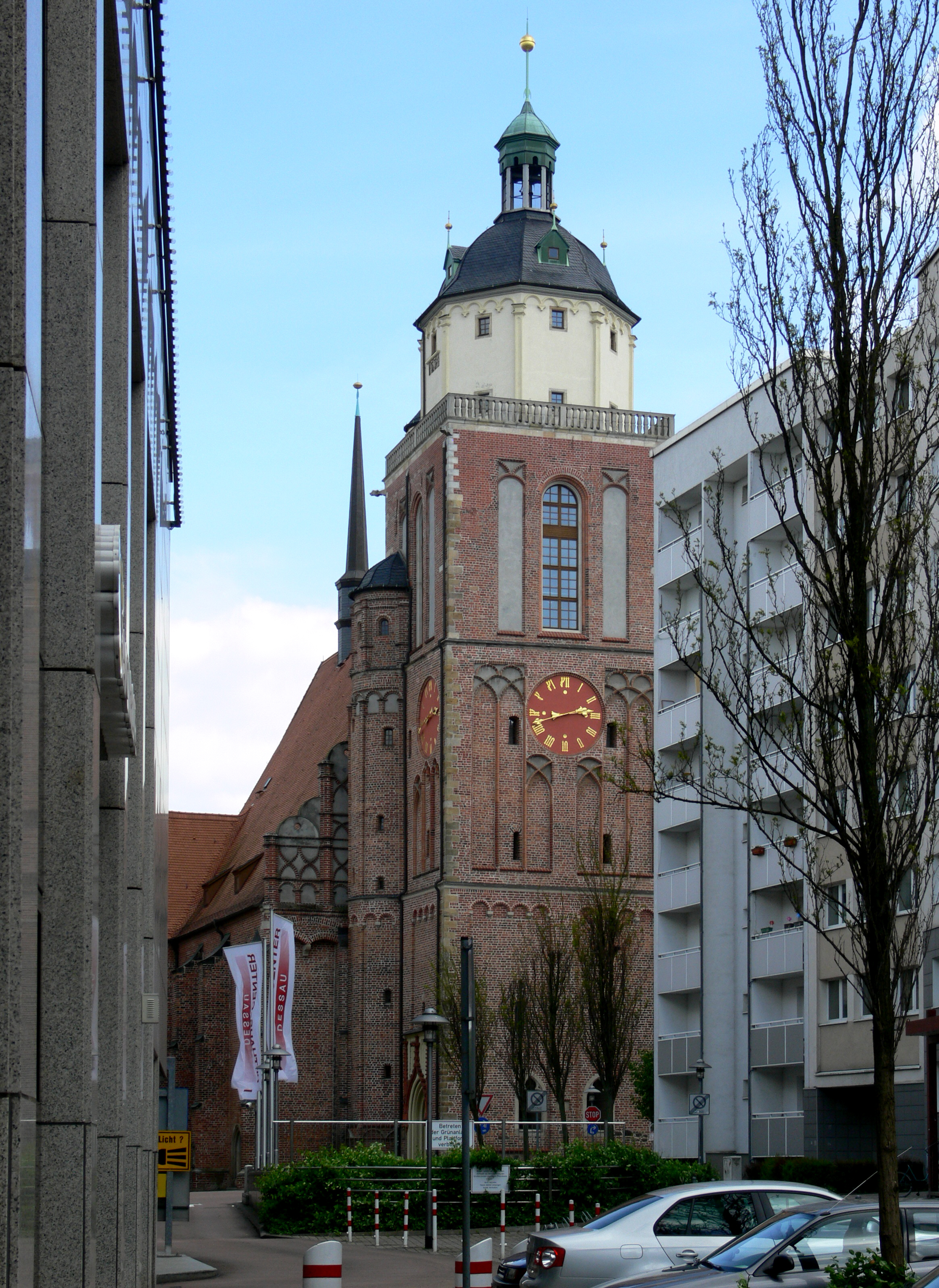 Dessau, Blick zur Marienkirche